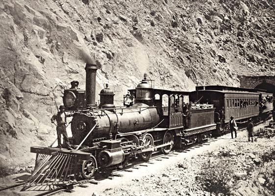 En ferrocarril central de Lima a La Oroya que se empezó a construir en 1871